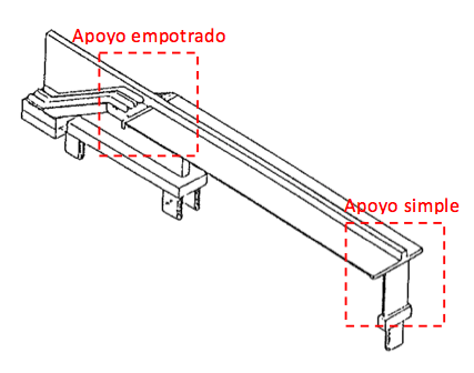 Perspectiva gráfica de la pasarela.